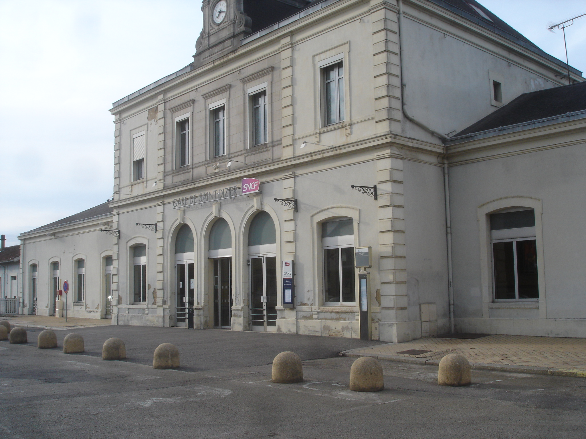 Photo du bâtiment façade extérieur.